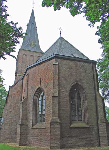 kerk van Sleen van de achterzijde gezien